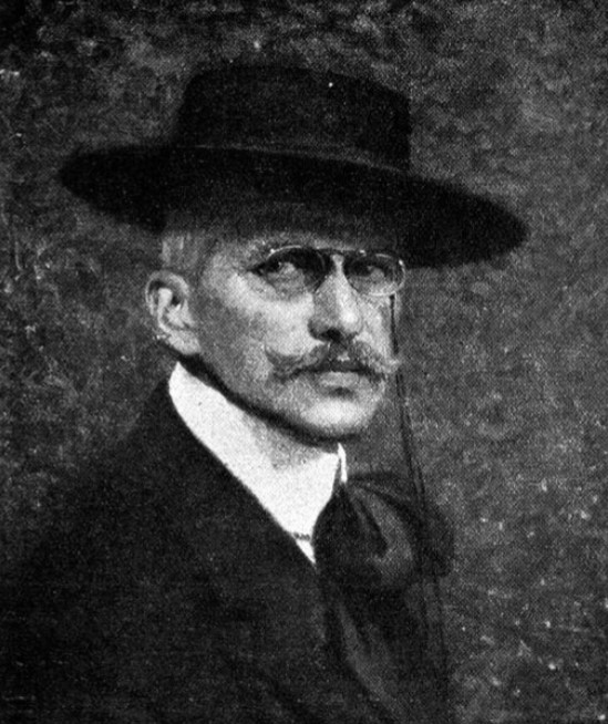 Emil Beurmann (1862–1951) Künstler, Schriftsteller aus Basel, Schweiz